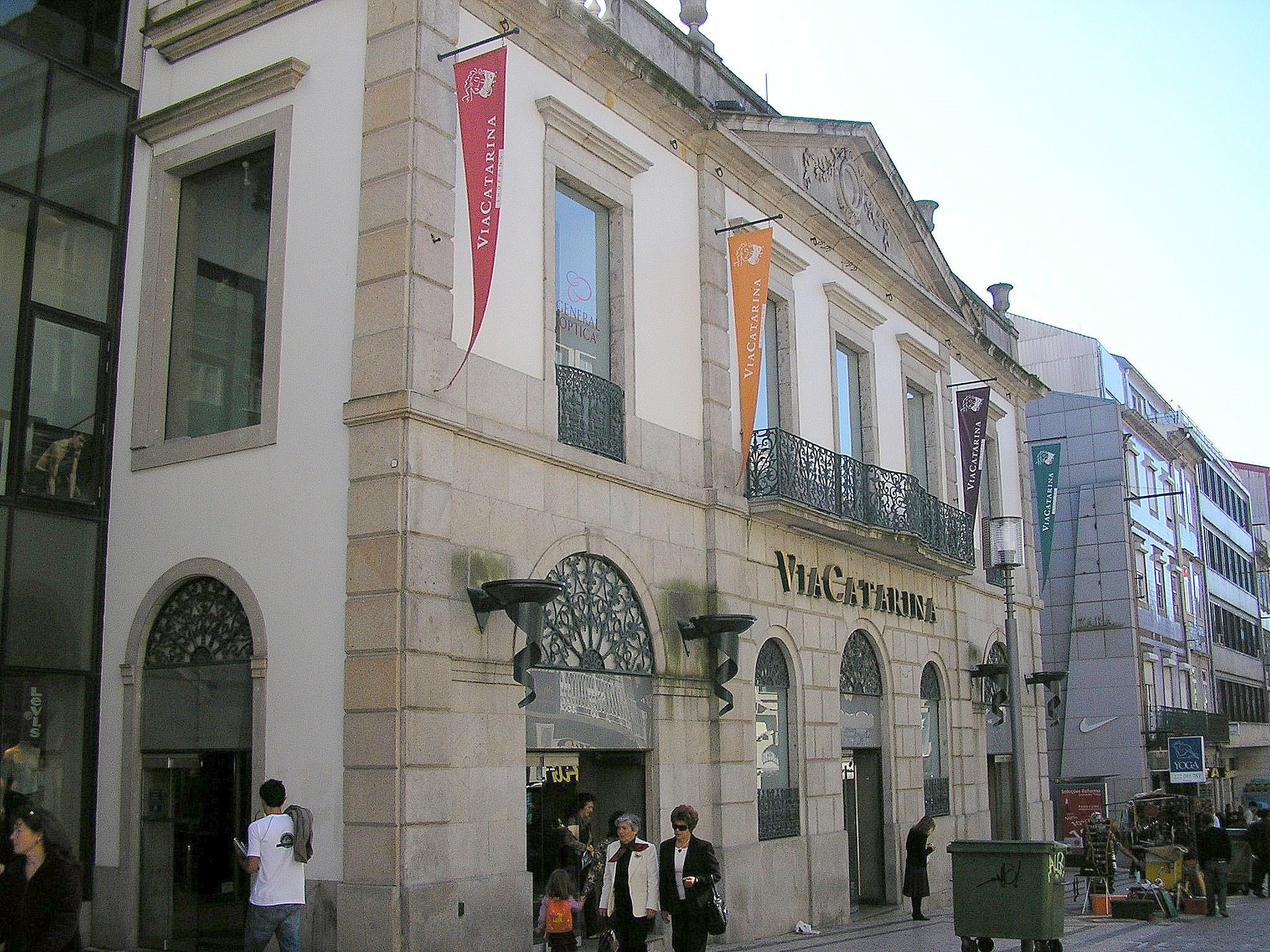 "Via Catarina" shopping centre in Porto, Portugal